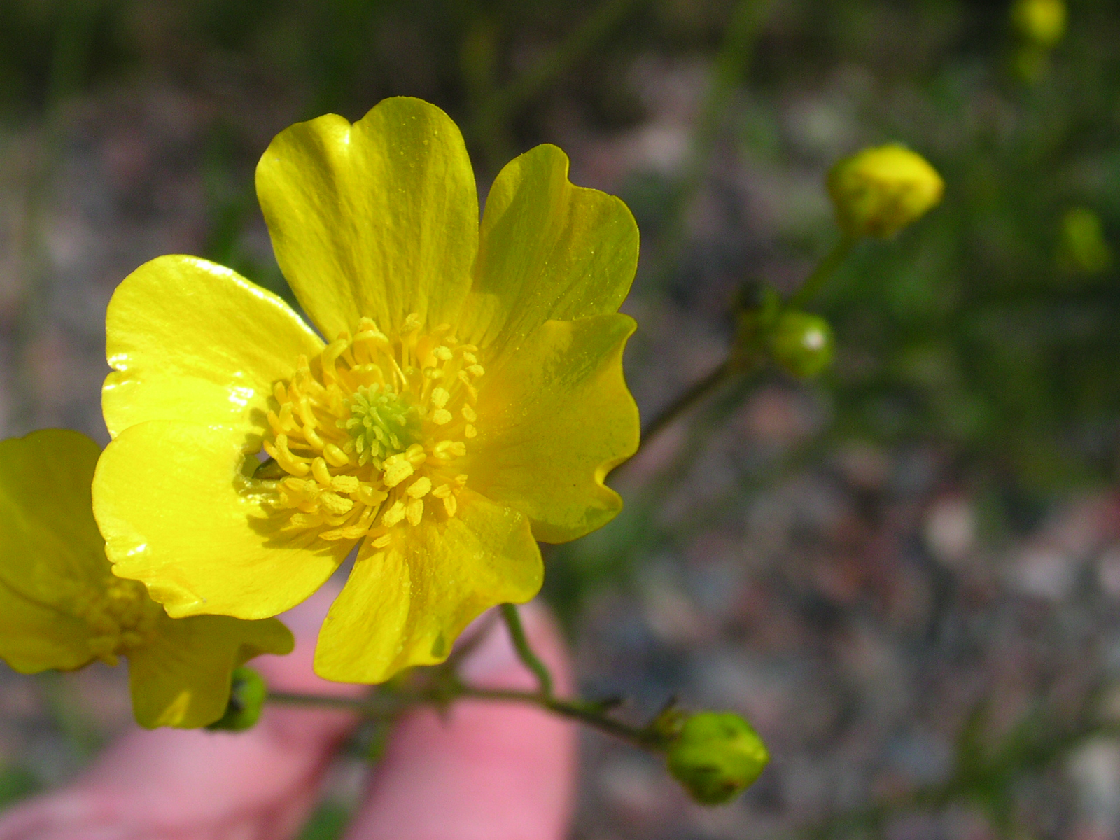 Ranunculus_acris_1